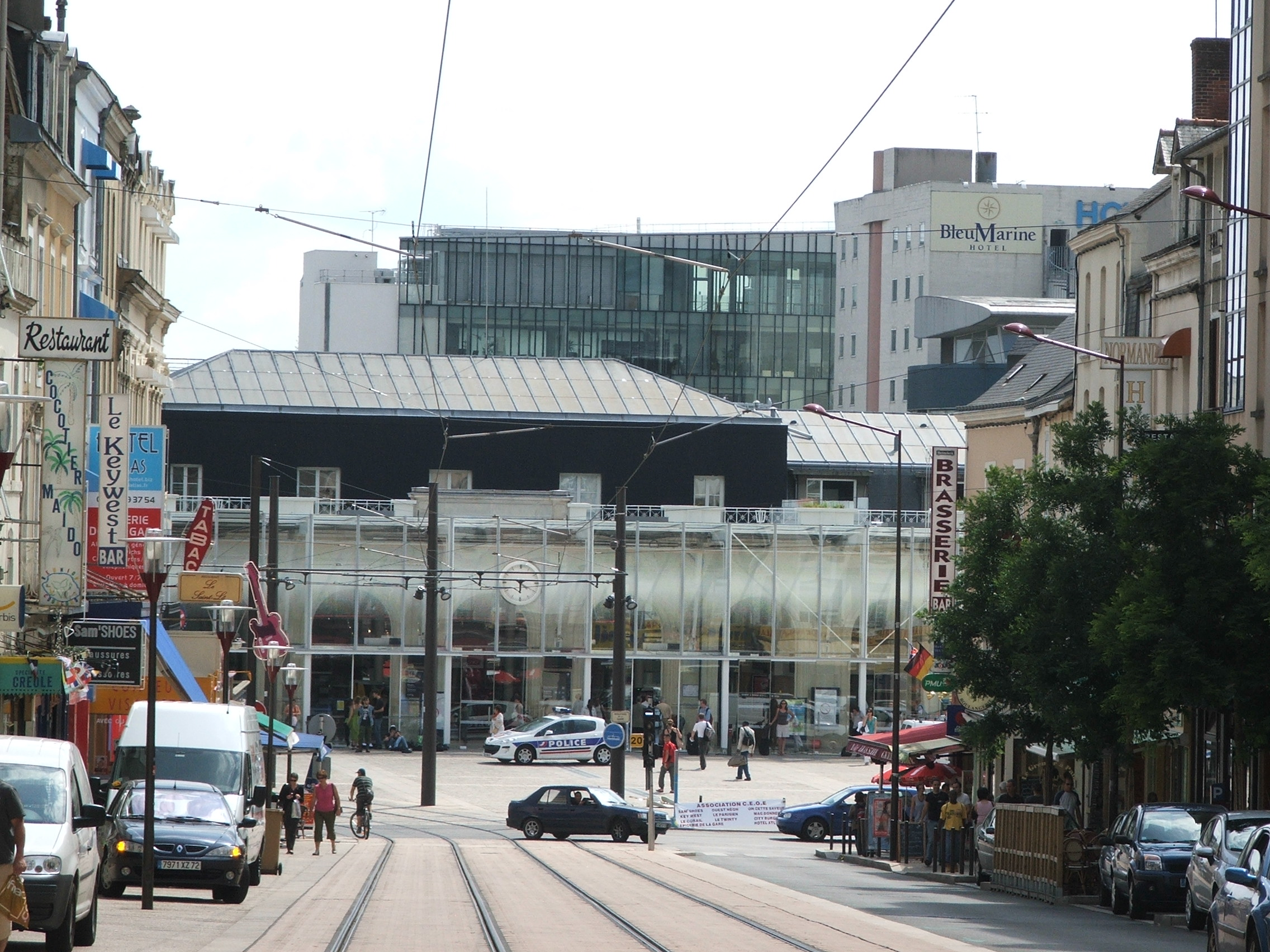 Le Boulevard de la Gare depuis l'avenue du général Leclerc, au moment de la scission avec le boulevard Emile Zola.